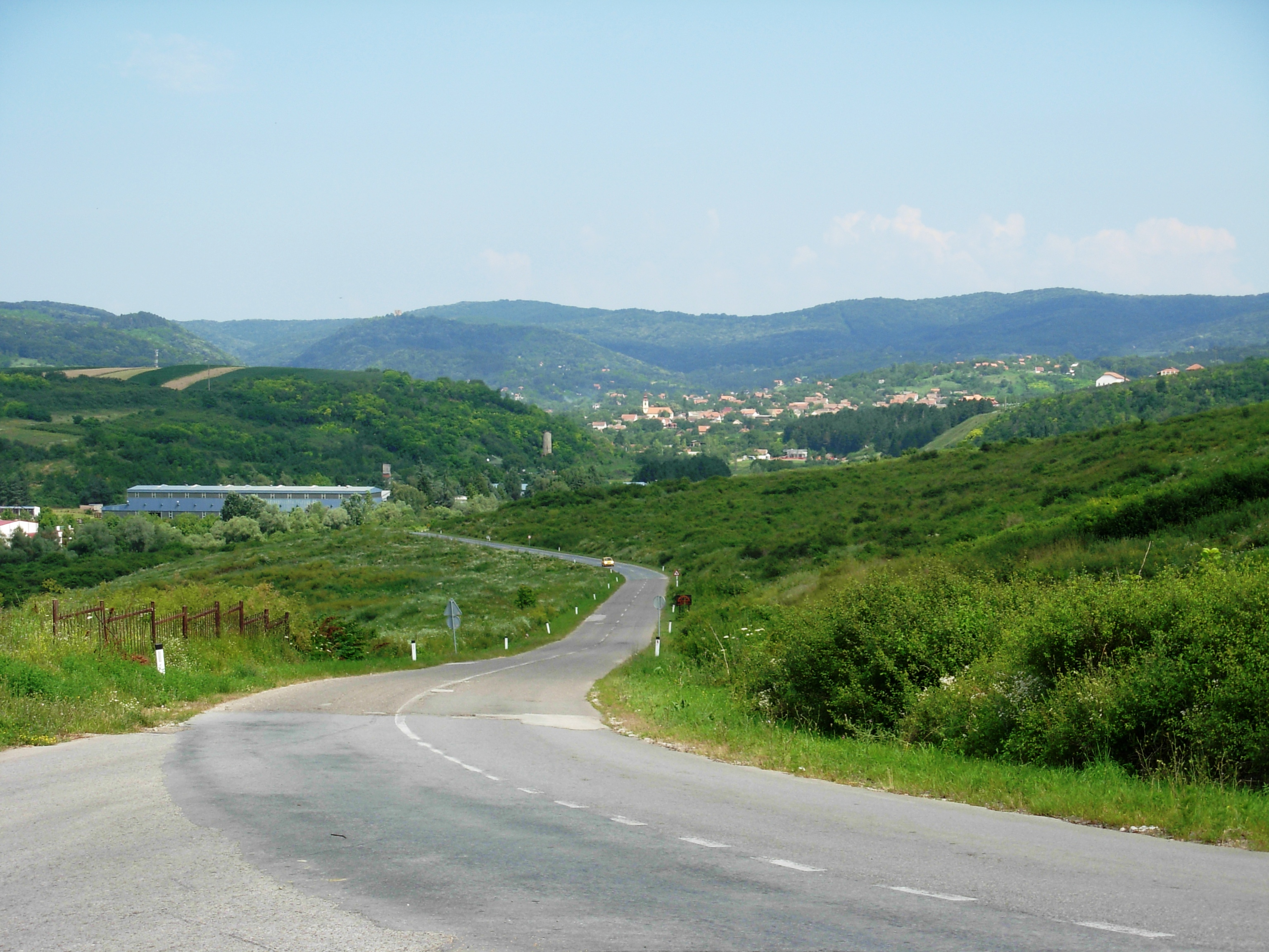 Pogled na Vrdnik sa puta iz pravca Rivice.